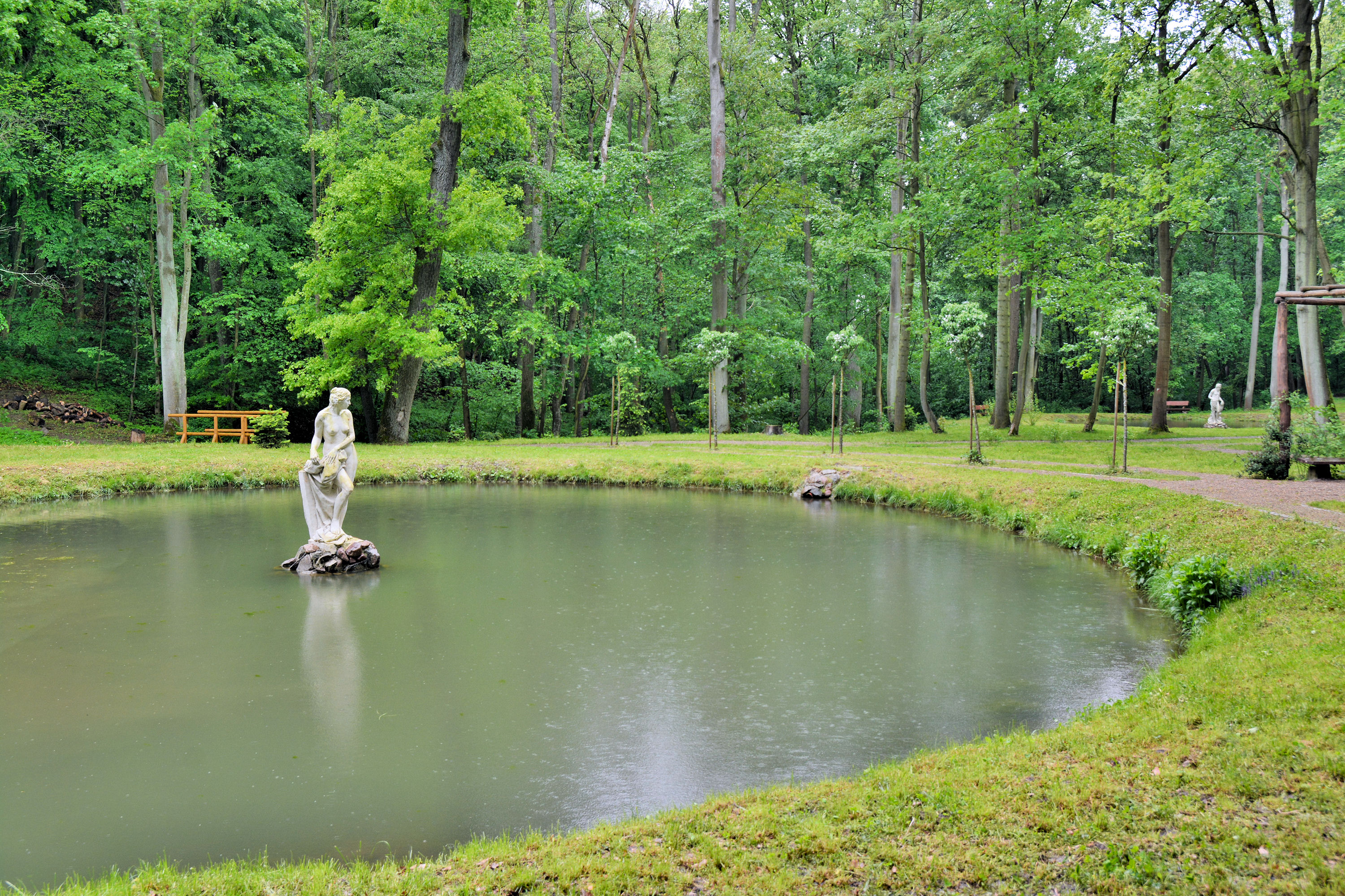 Dolina Miłości we wsi Zatoń Dolna (woj. zachodniopomorskie)